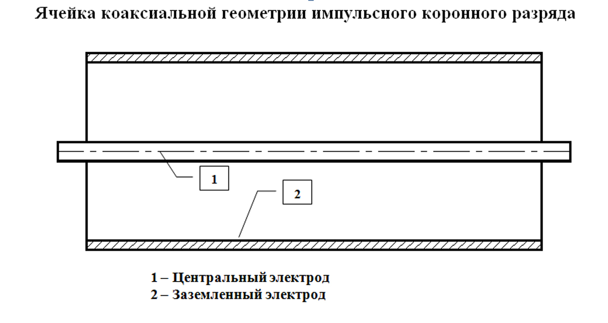 Схема озонатора коронного разряда